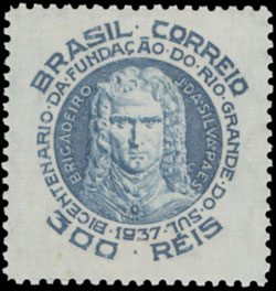 Selo comemorativo ao bicentenário da fundação da cidade de Rio Grande, RS. Correios do Brasil. 1937.